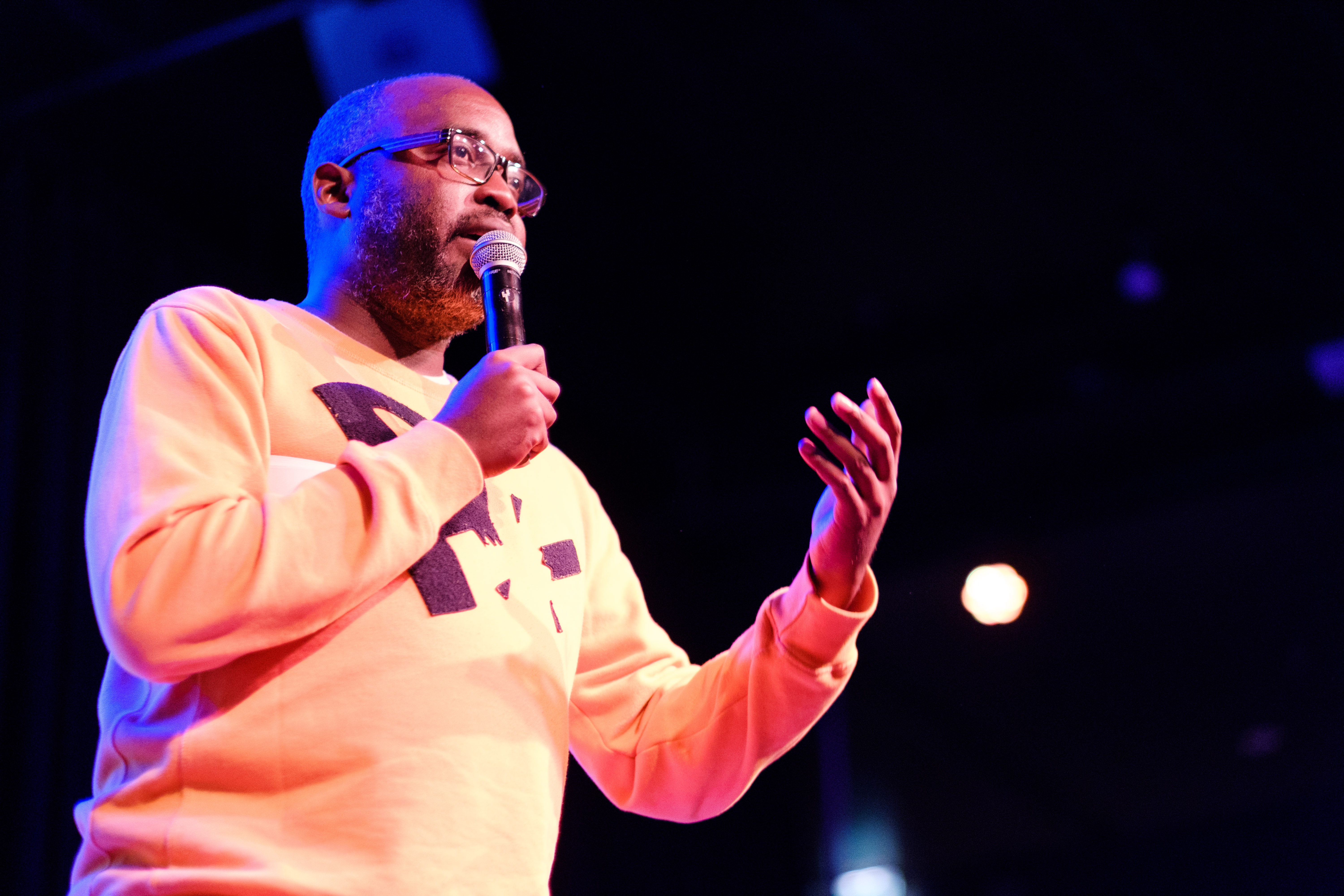 Op 30 oktober organiseerde Pact Utrecht een bijeenkomst voor alle Utrechtse cultuurmakers over culturele inclusiviteit. Met keynote lezingen van Adeshola Tunde Adefioye (dramaturg KVS Brussel) en Rajae El Mouhandiz (artistieke duizendpoot en oprichter Maghreb Takent), workshops van o.a. Binoq Atana, Karima Belhaj, Lida van den Broek (Kantharos) en een gesprek met Utrechtse cultuurmakers over culturele diversiteit in de context van de Domstad. Dagvoorzitter is Andrew Makkinga. De bijeenkomst werd afgesloten met een gezamenlijk diner. Pact Utrecht is een netwerk van Utrechtse cultuurmakers. Het netwerk zoekt met elkaar en binnen de eigen organisaties naar strategieën om inclusiever te worden. Dat doet het netwerk vanuit de overtuiging dat Utrecht gebaat is bij meer contact tussen verschillende mensen, meer eige- naarschap van diverse groepen en een gedeelde cultuurbeleving. Het netwerk van Pact Utrecht bestaat op dit moment uit medewerkers van Het Huis Utrecht, Theatergroep Dox, TivoliVredenburg, Museum Catharijneconvent, New Dutch Connections, Gemeente Utrecht, ZIMIHC podium voor amateurkunst, ROC Midden Nederland, Insomnio Ensemble, Operamakers, Jongeren Cultuurhuis Kanaleneiland en De Coöperatie.